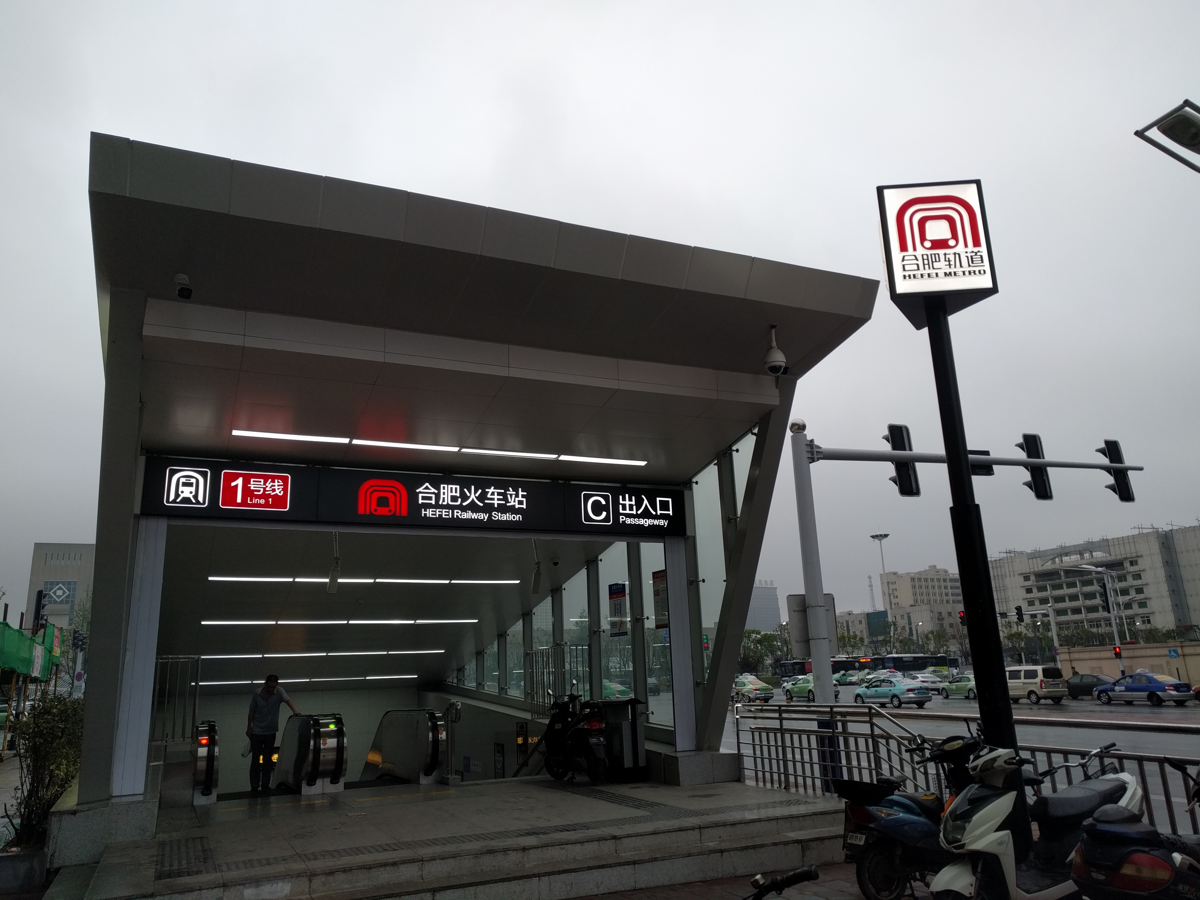 合肥地铁合肥火车站